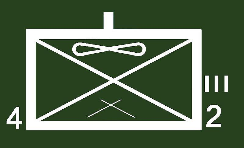 Luftwaffensicherungskompanie